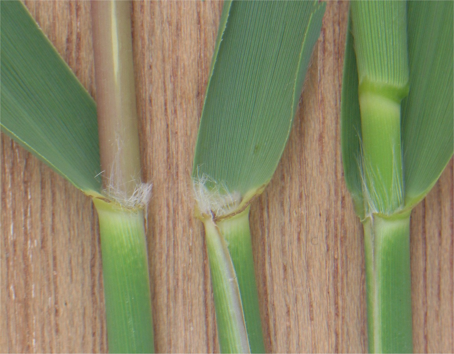 Schilfrohr (phragmites australis), Blatthäutchen.